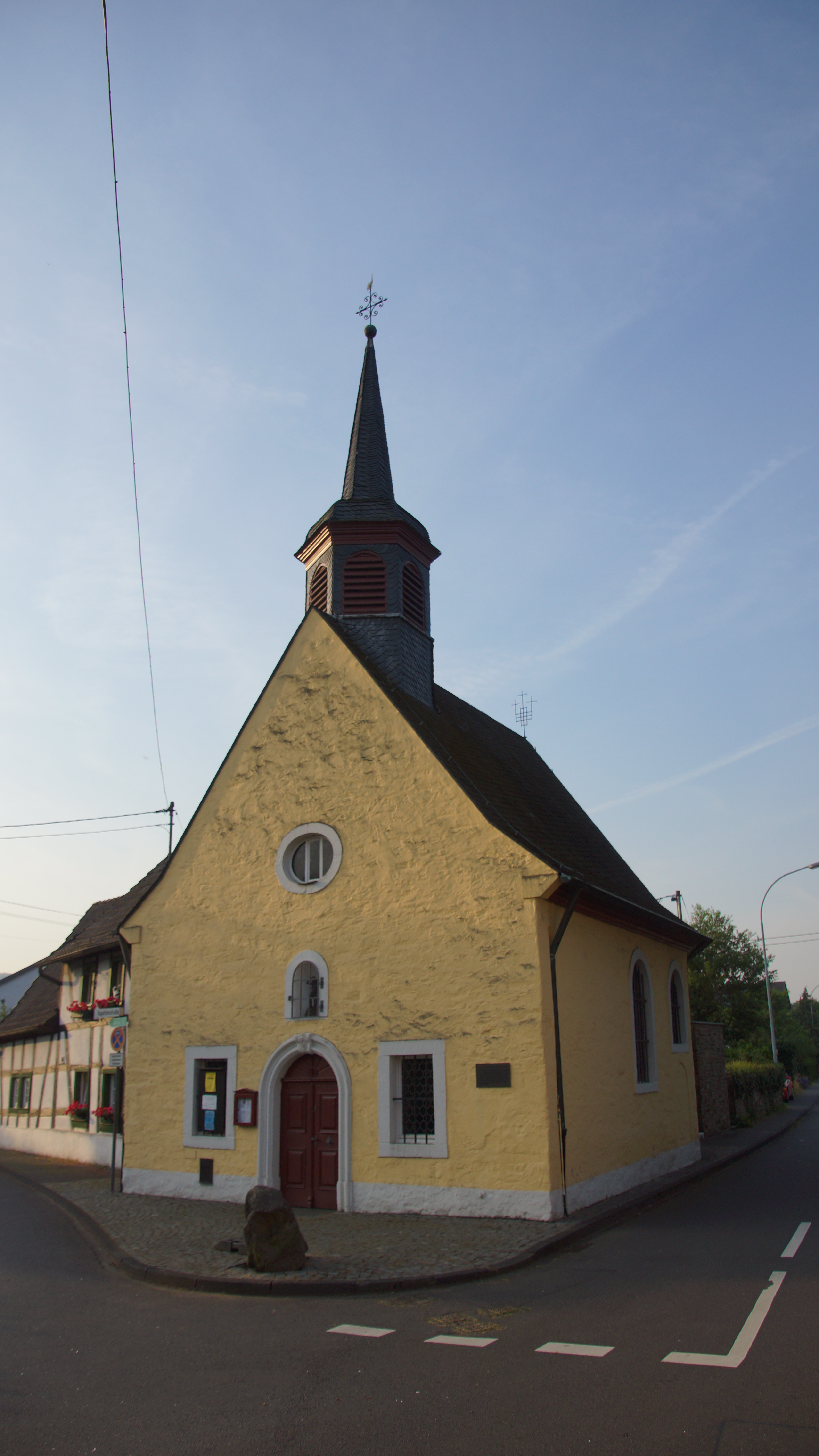 katholische Kapelle St. Sebastian in Unkel-Heister, Sebastianstraße